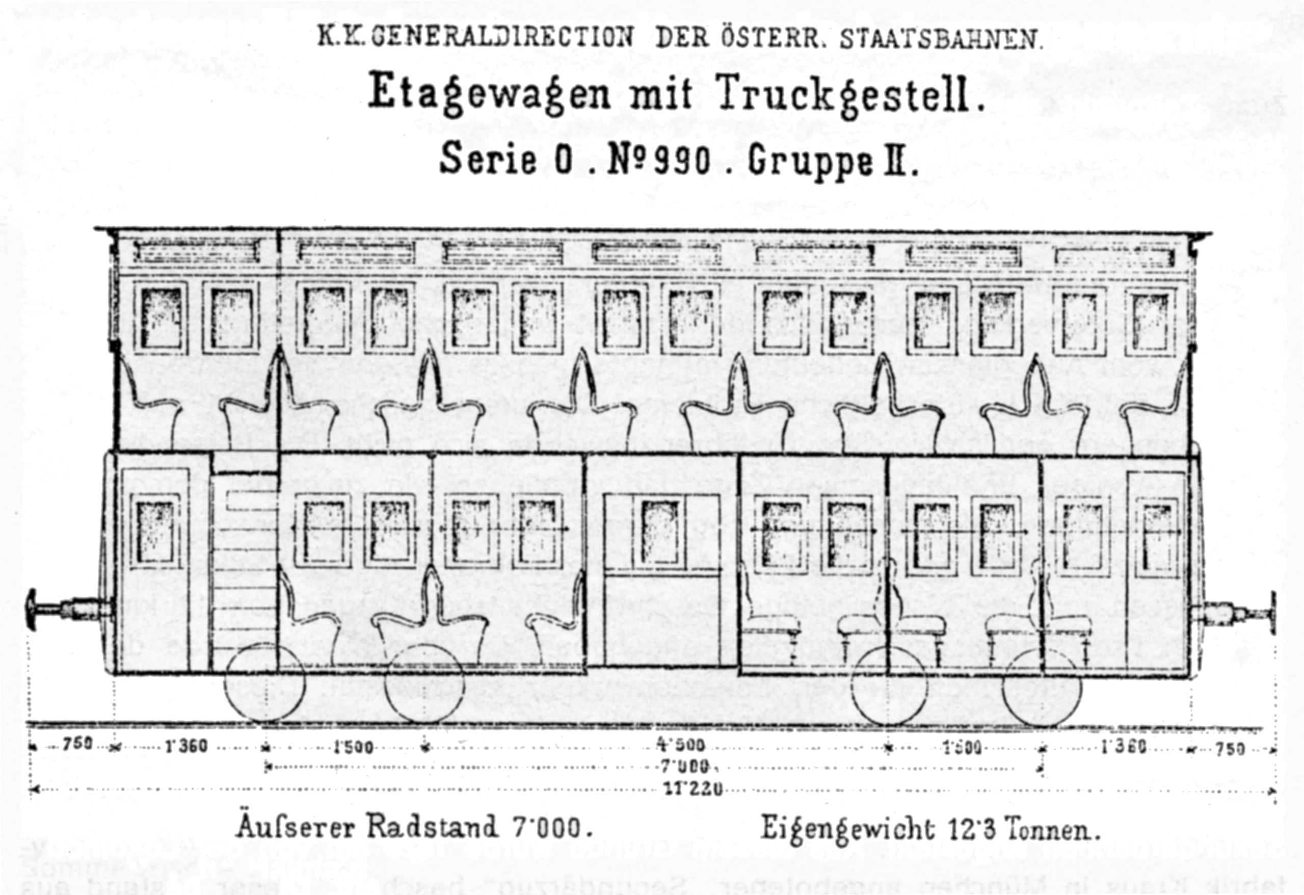 Leobersdorfer Bahn, Etagewagen, Systemzeichnung